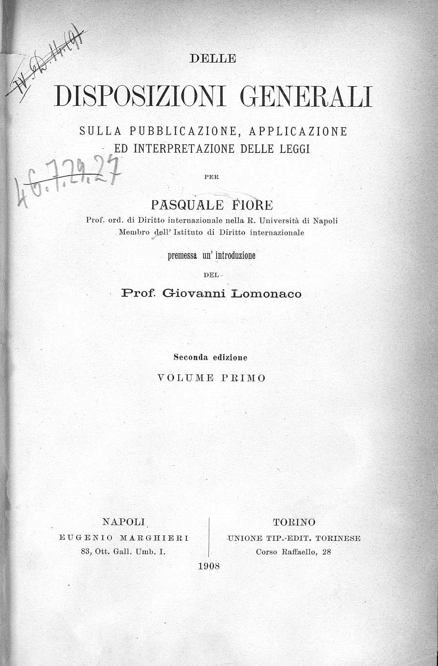 Frontespizio